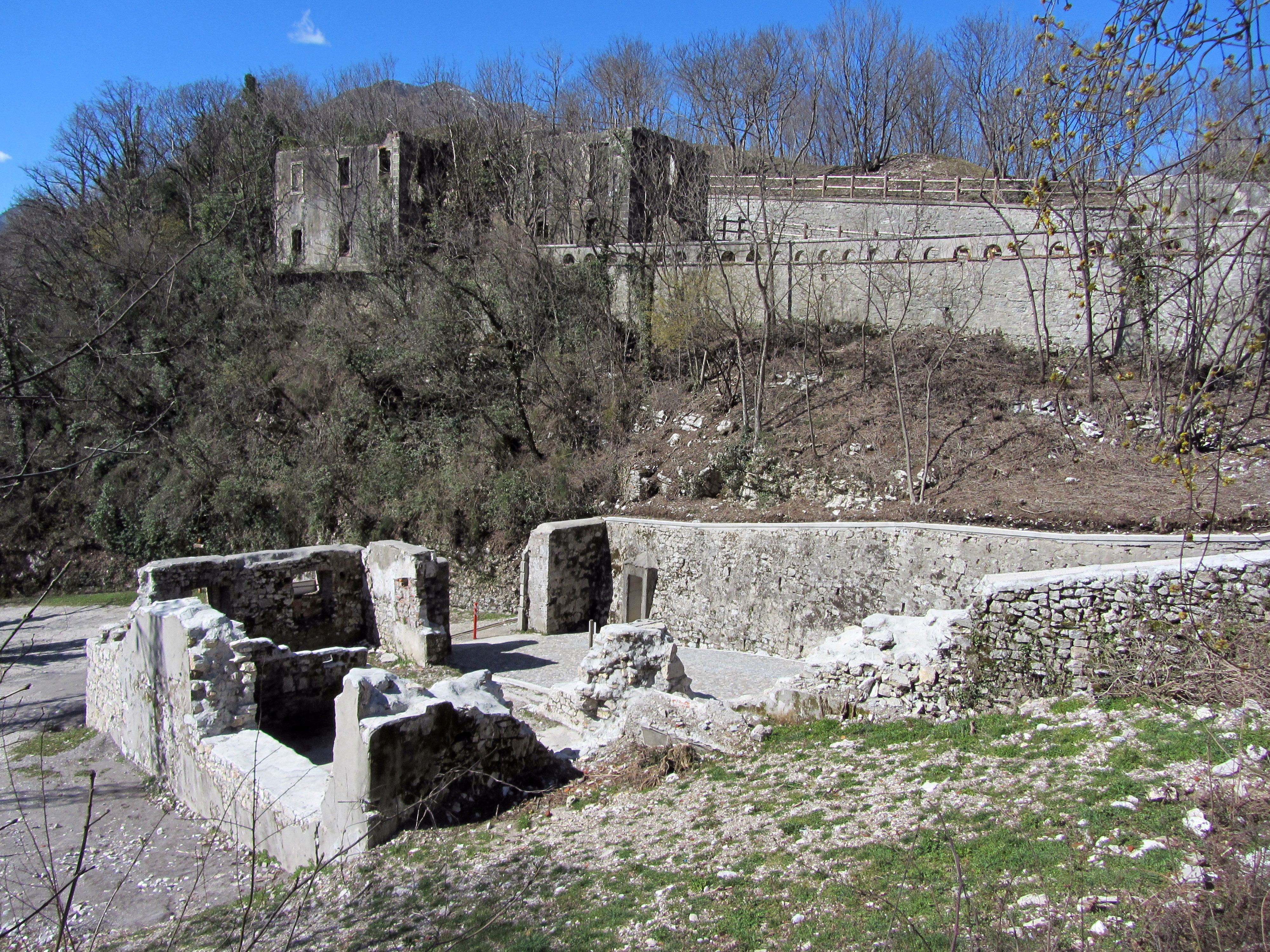 Forte di Monte Ercole Ospedaletto di Gemona (UDINE) - ITALY - Corpo di guardia ed alloggi ufficiali